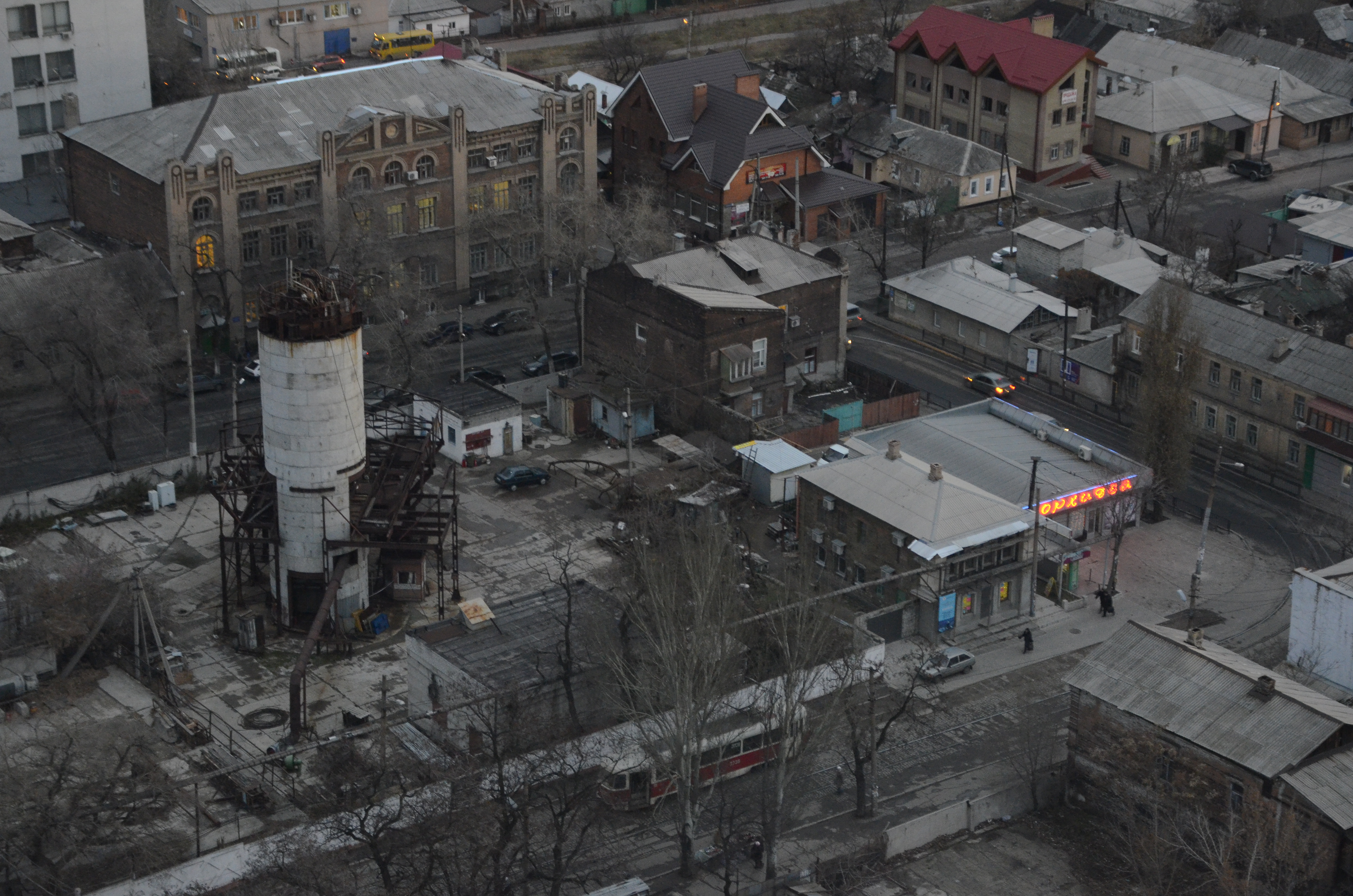 Вид Донецка с 20 этажа торгово-развлекательного комплекса Green Plaza